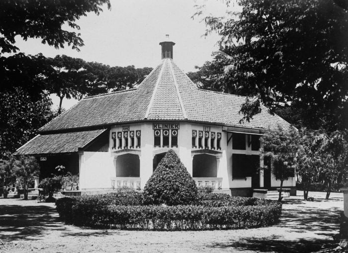 Repronegatief. Rond 1900 begon ook de Protestante zending zich voor medisch werk op Java te interesseren, later gevolgd door de rooms-katholieke missie. Er kwamen zendingsartsen, zendingshospitalen en de daarbij behorende verpleegsters. De zendingshospitalen namen het initiatief voor een nieuw stelsel, het zogeheten Jogja-systeem, omdat het begon met het Petronella hospitaal in Jogja. Het betrof hier een hiërarchisch systeem van een centraal ziekenhuis met hulphospitalen en poliklinieken. De zending en de missie werkten in het Jogja-systeem samen met de koloniale en inheemse overheid en met de particuliere ondernemingen. De laatste subsidieerden bijvoorbeeld het Petronella hospitaal te Jogjakarta. Maar de grotere ondernemingen zetten ook wel hun eigen netwerken op. Dit gold bijvoorbeeld voor veel suikerondernemingen, waarbij men niet zelden het Jogja-systeem kopieerde. De ondernemingen, die vooral in de campagnetijd geen man konden missen, besteedden ook veel aandacht aan de preventie van ziektes als malaria en mijnworm. (P. Boomgaard, 2001). Kliniek van de Suiker Onderneming Ngandjoek, Oost-Java Kliniek van de suikeronderneming Ngandjoek, Oost-Java, 1920